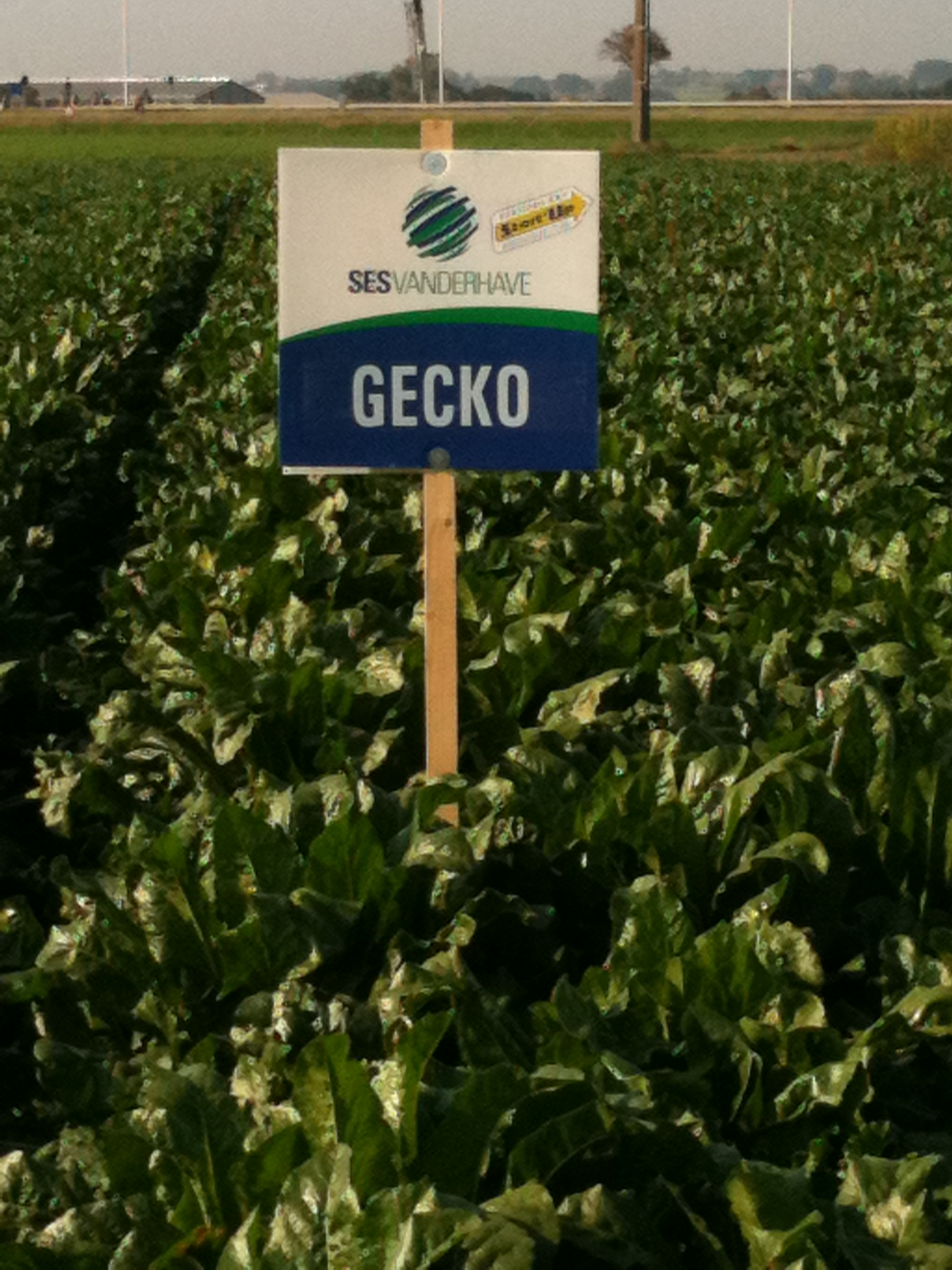 Zuckerrübensorte Gecko des Züchters SESVanderHave